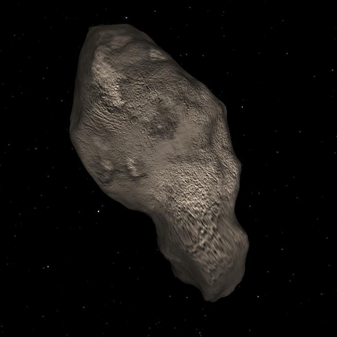 Astéroïde (4179) Toutatis